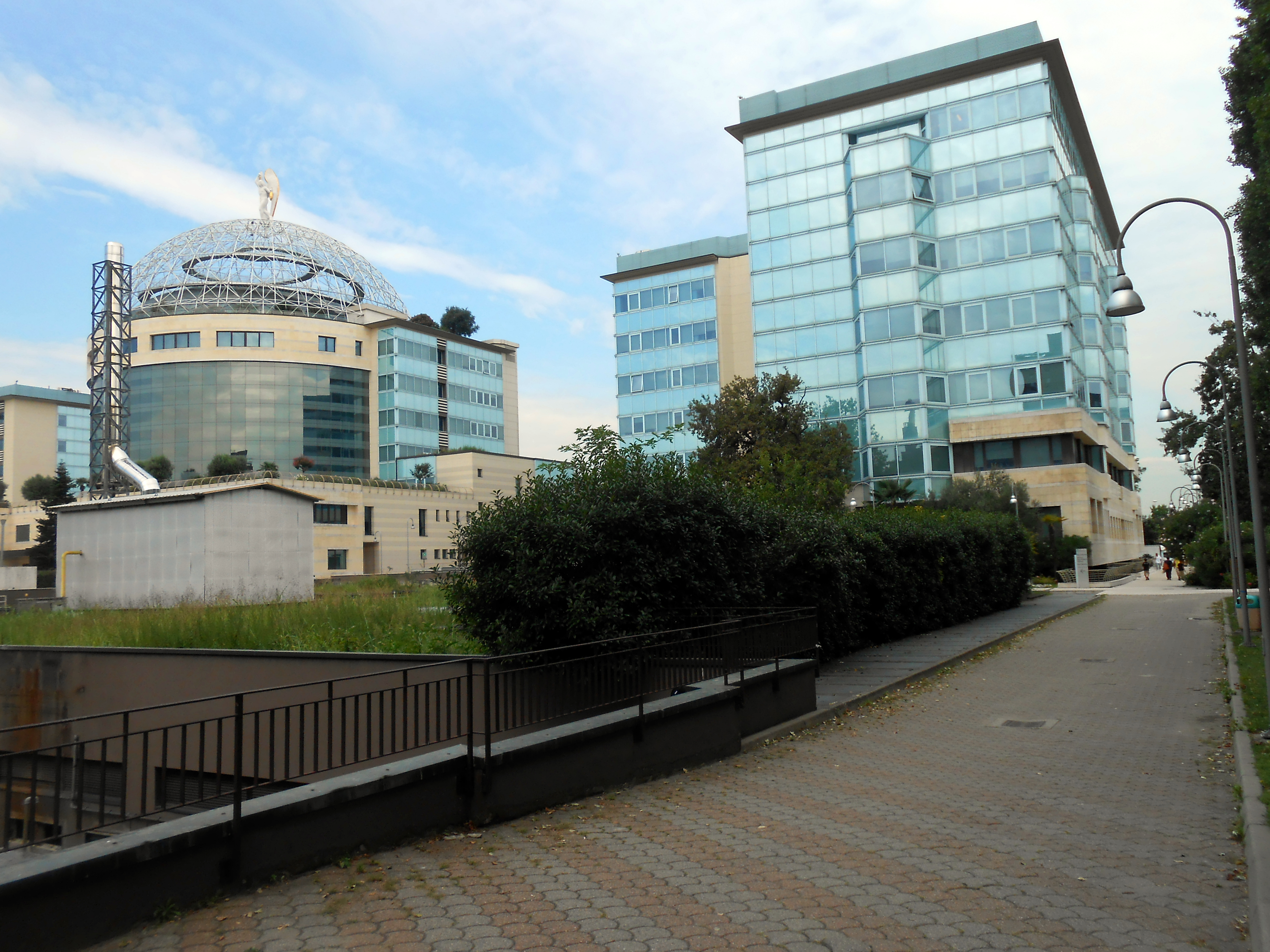 Panoramica della Basilica ed alcuni nuovi reparti del HSR